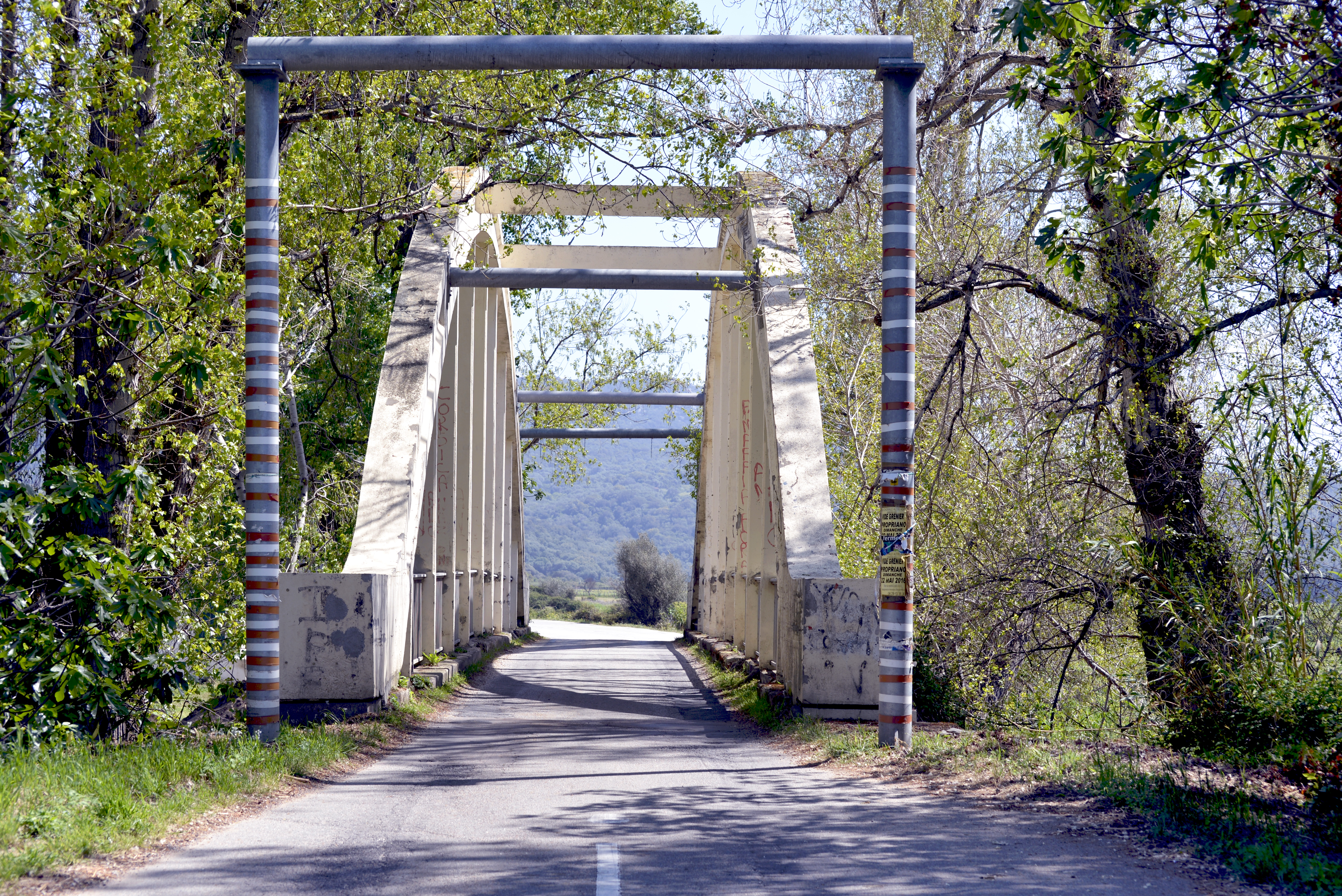 Sollacaro, Valinco (Corse-du-Sud) - Pont Caitucoli de la route D157 donnant accès à Favalella (Serra-di-Ferro)